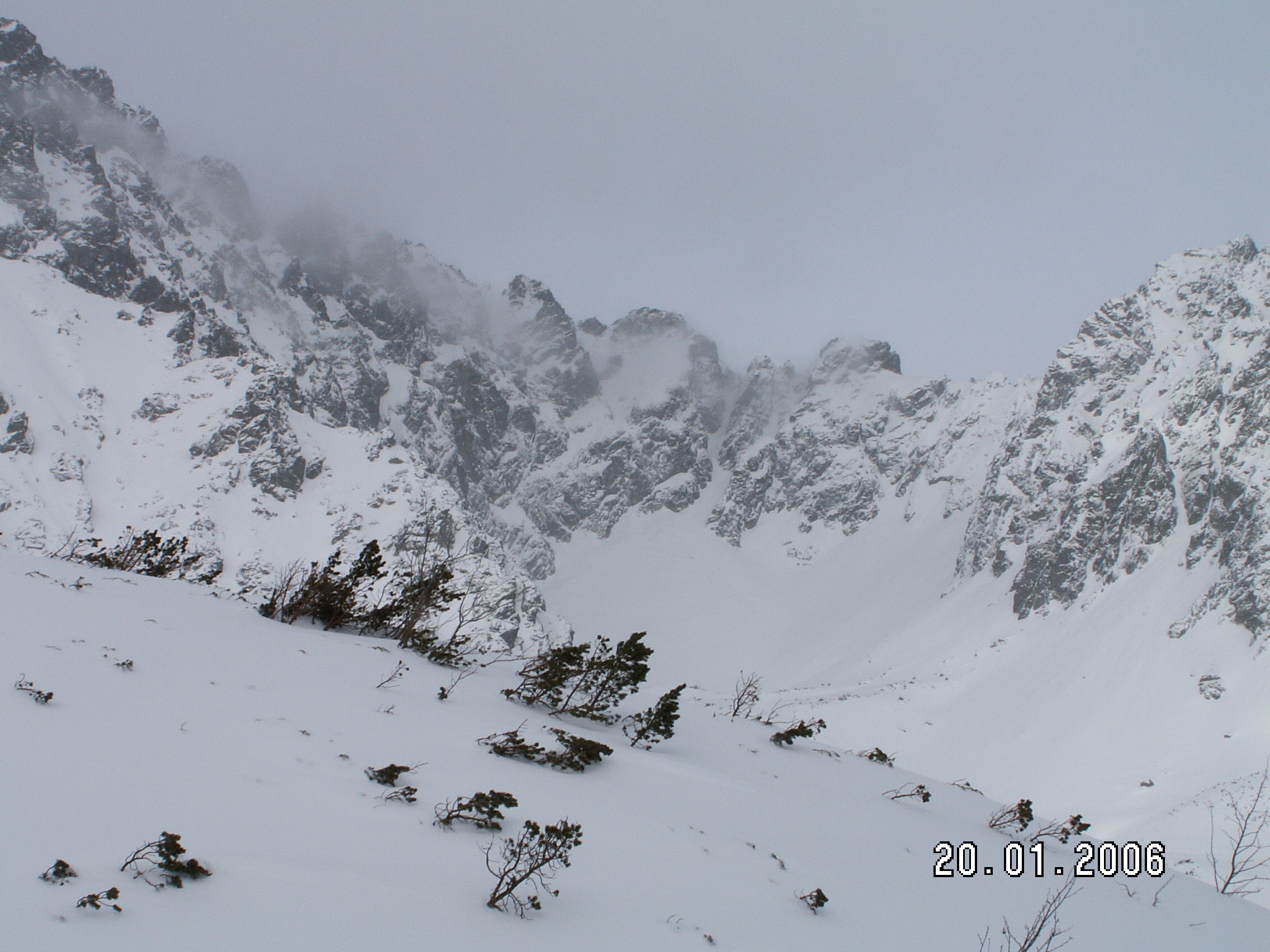 Buczynowe Turnie, autor: mychaus